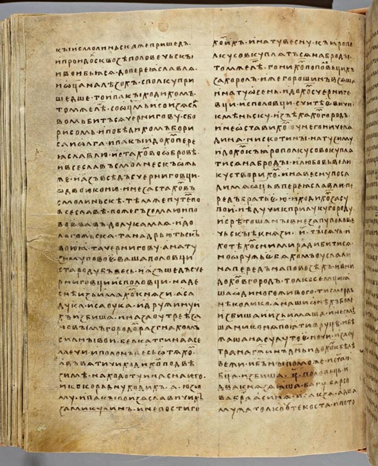 Содержит часть поучения Владимира Мономаха с описанием его военных походов.